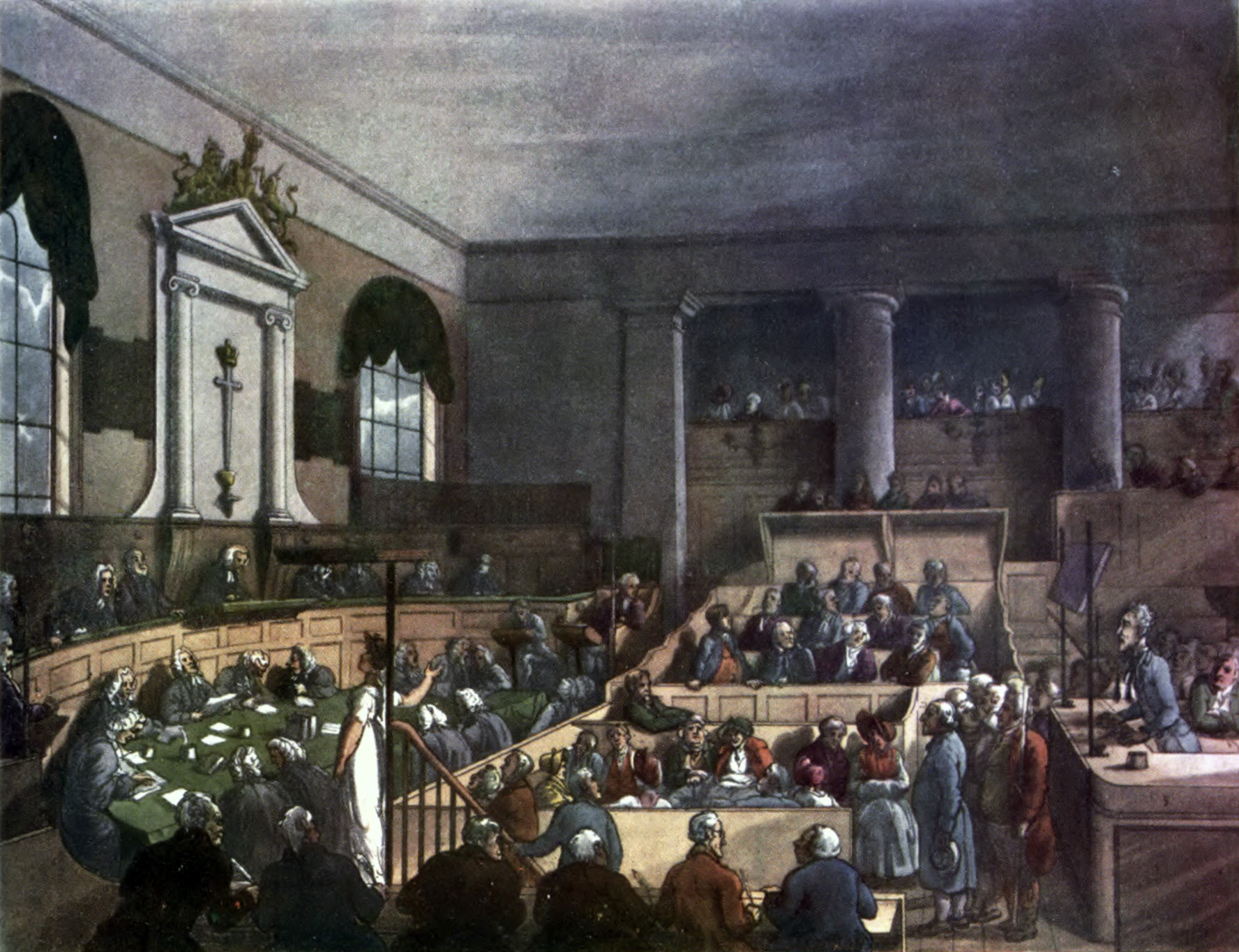 Old Bailey